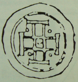 II. Endre érméje a Szent sír lovagjainak jelképeivel